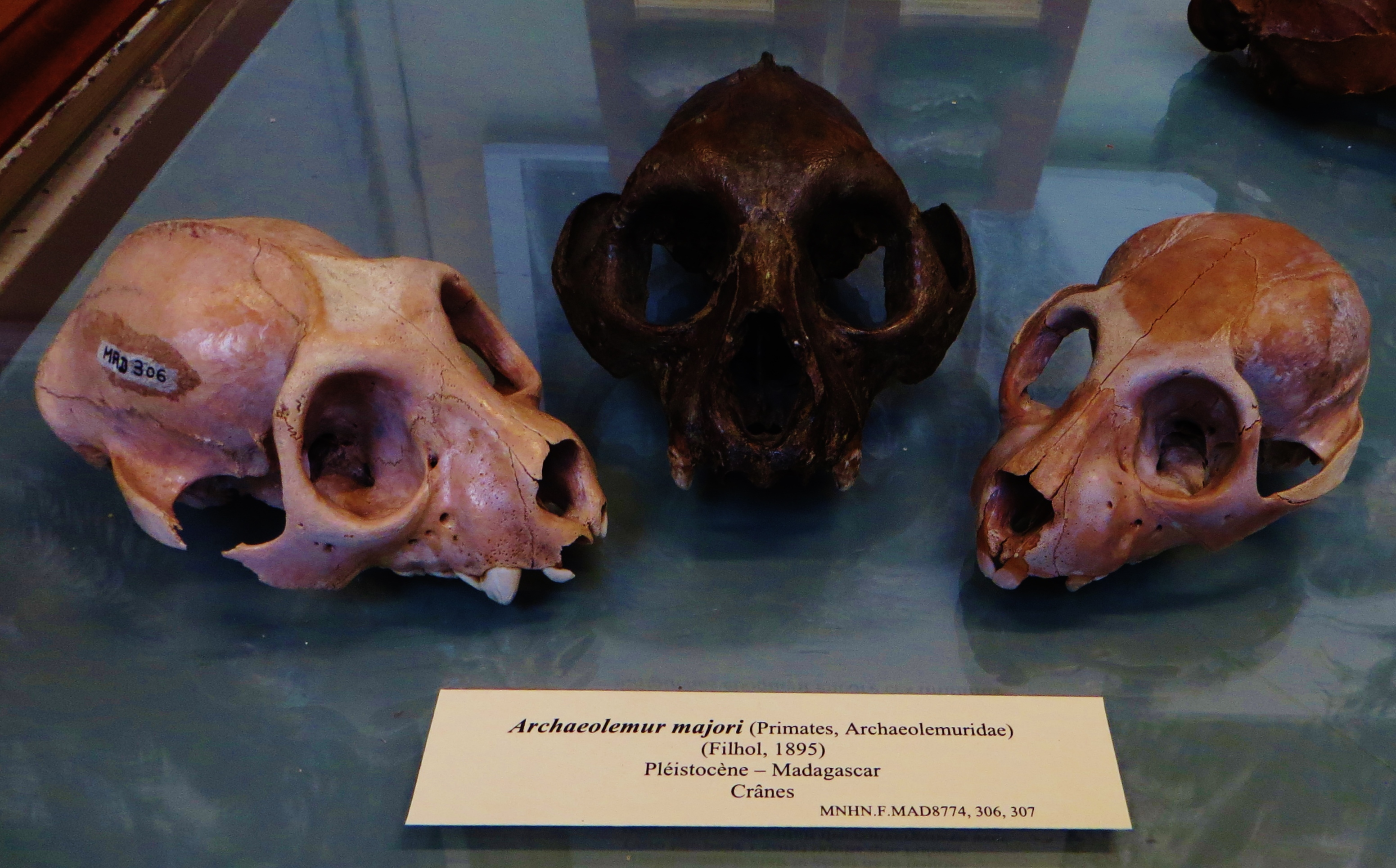 Fossil of Archaeolemur, an extinct mammal- Took the photo at Museum Histoire Naturelle, Paris